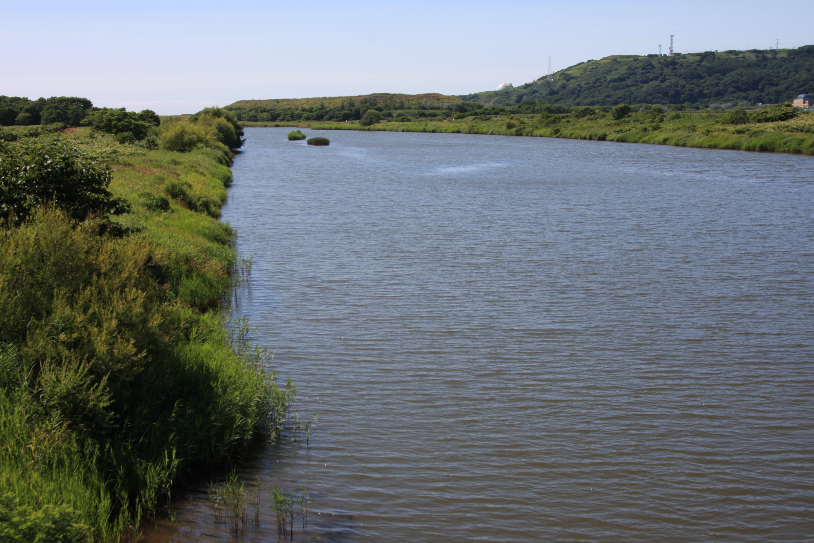 鎧橋より望む堀株川と泊原子力発電所原子炉